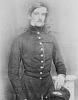 Portrait of Jérôme Napoléon Bonaparte (1805-1870))